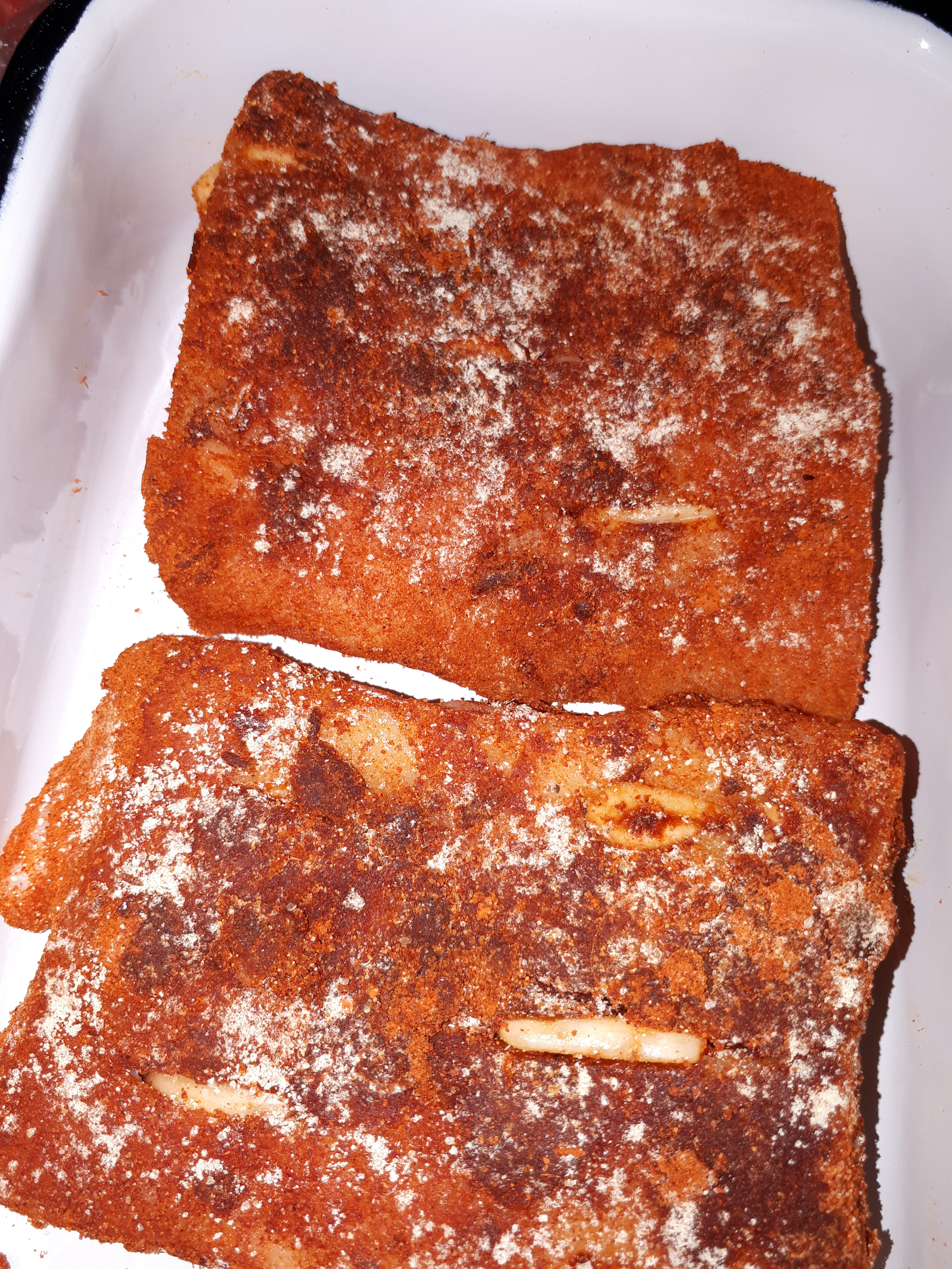 Приготовление сала